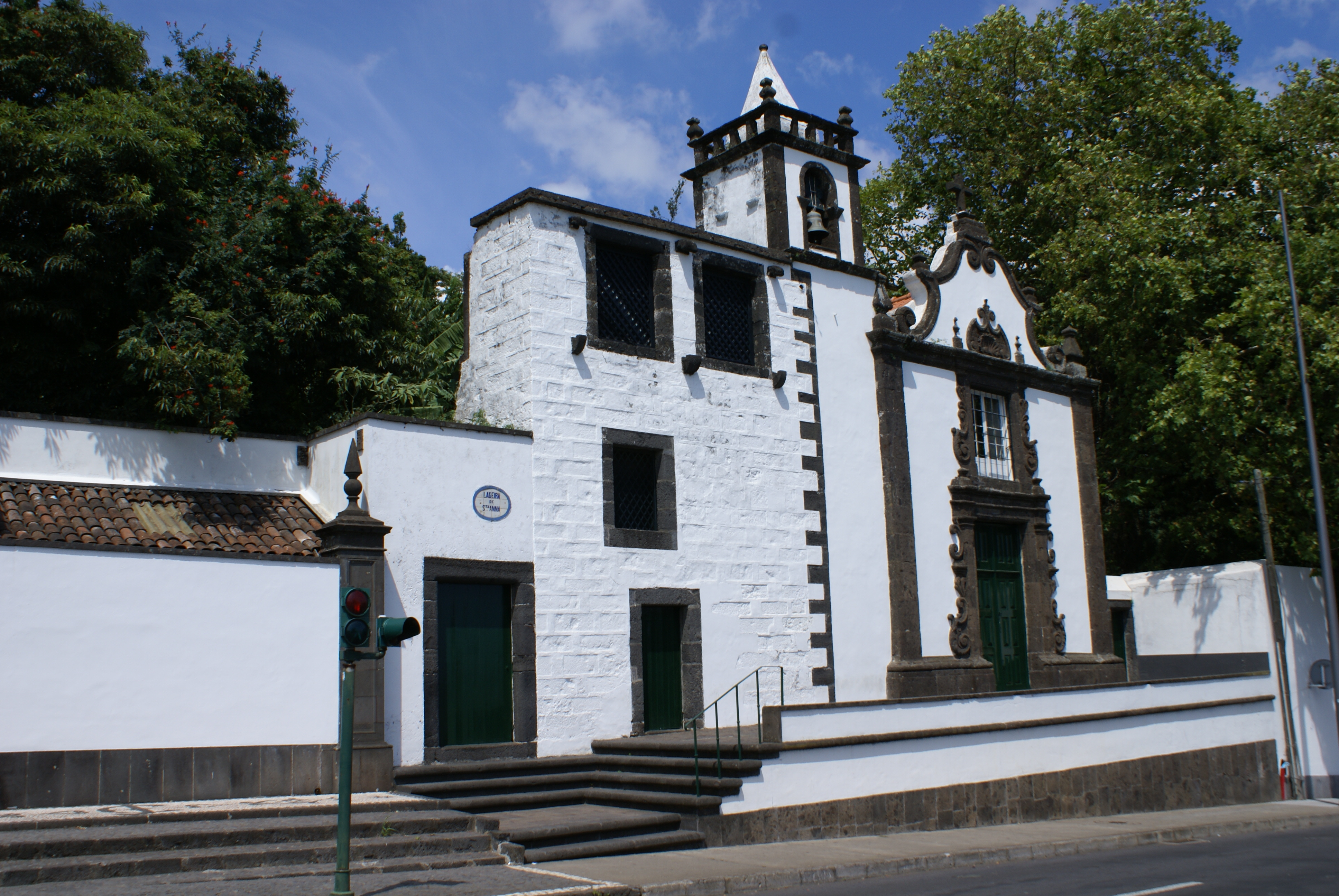 Chapel of Santa Ana, São Sebastião, Ponta Delgada, São Miguel (Azores), Portugal